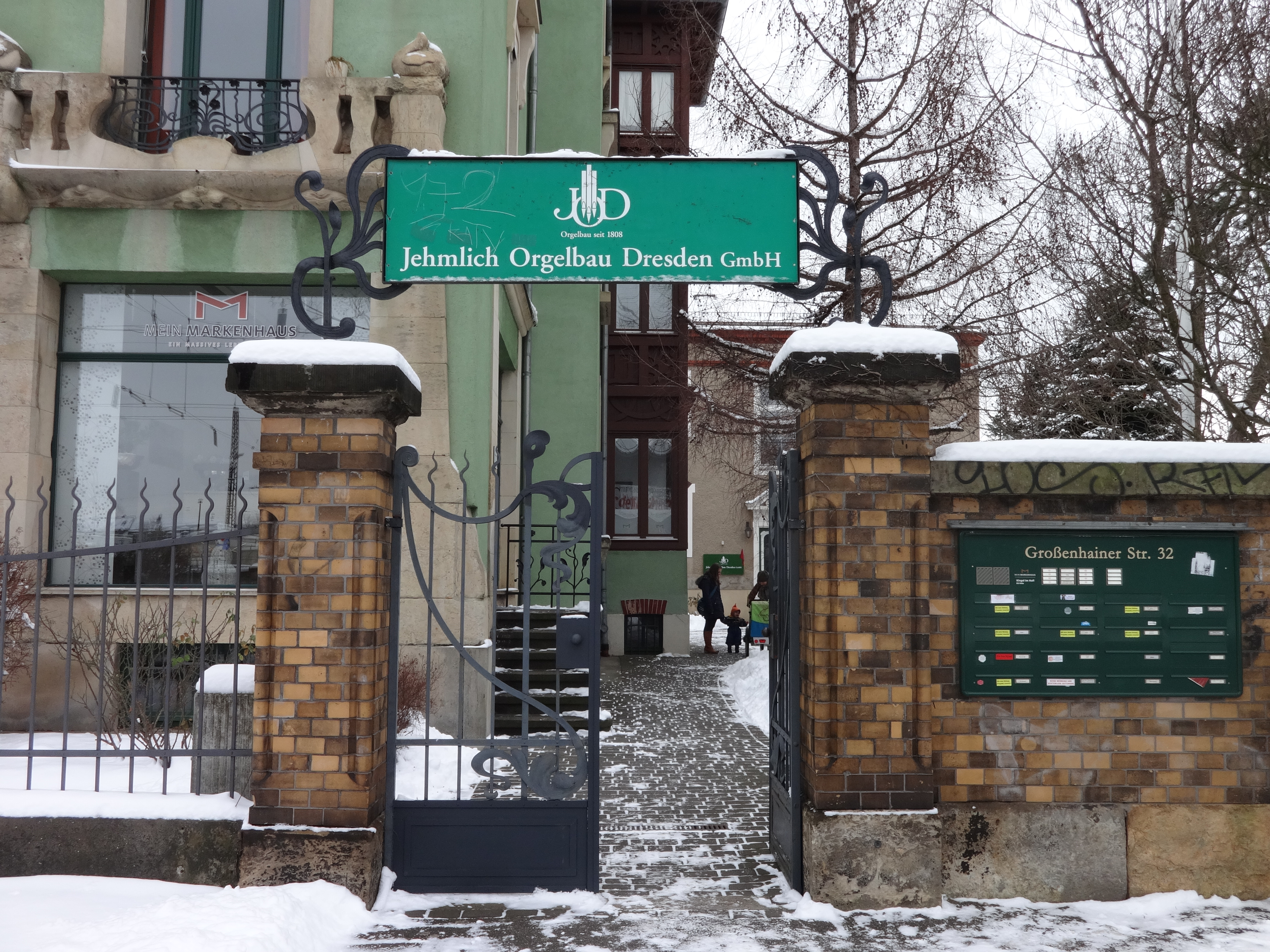 Großenhainer Straße 32, Hinterhaus: Jehmlich-Orgelbau